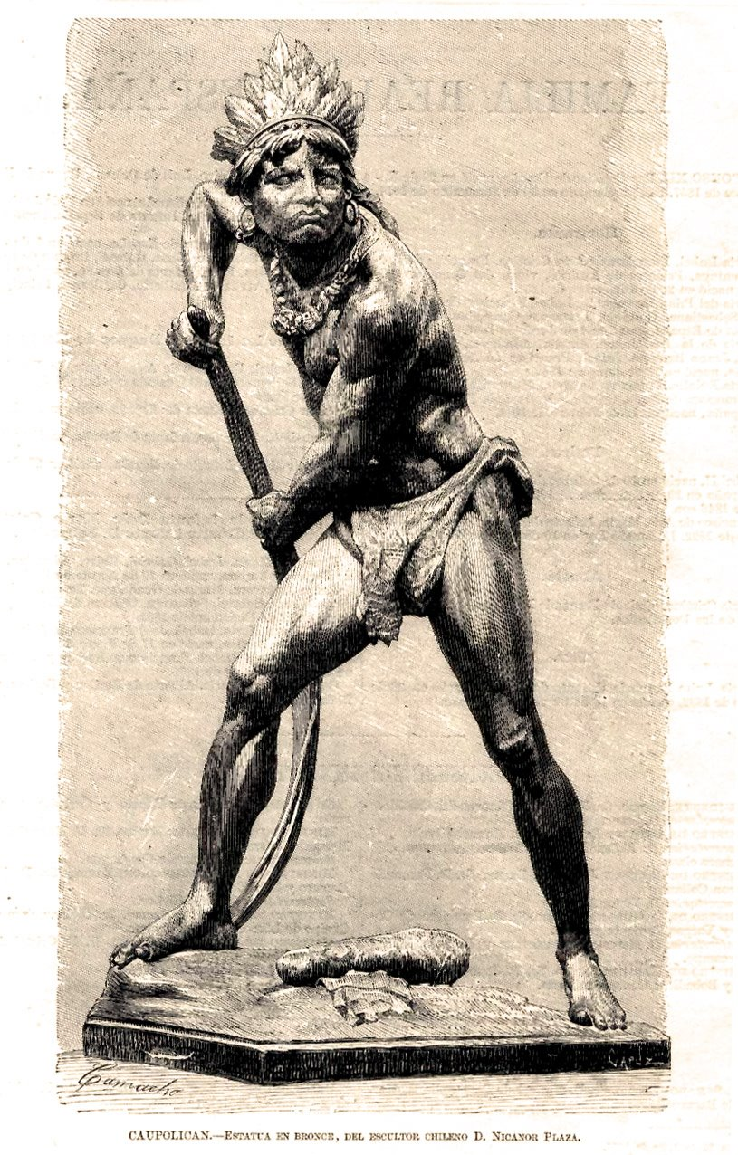 Grabado de la estatua del caudillo mapuche Caupolicán, hecha por el escultor Nicanor Plaza.